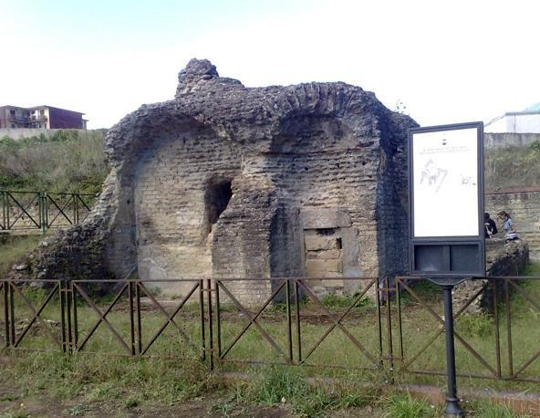 Mausoleo funerario presso il polo artigianale di Pianura